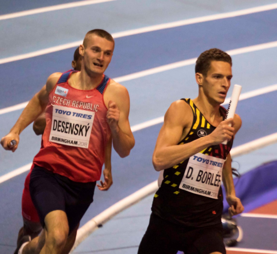 WK3A0183 4x400 reeksen dylan